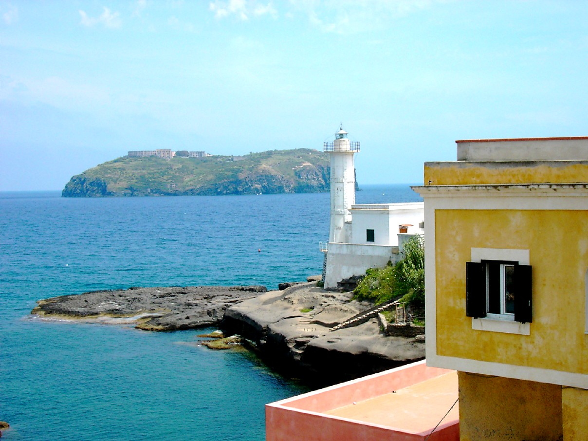 Santo Stefano vista da Ventotene